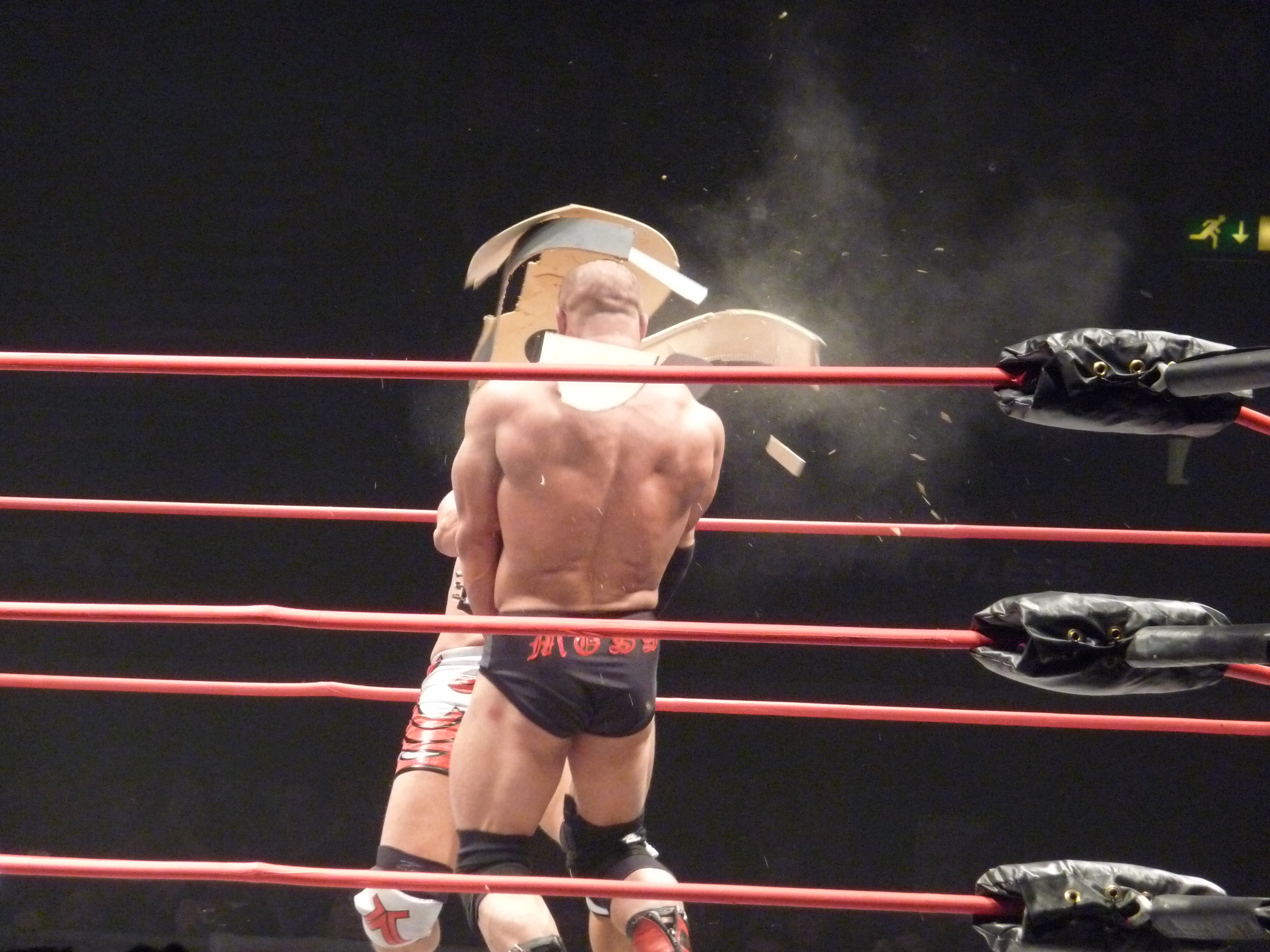 Boom!